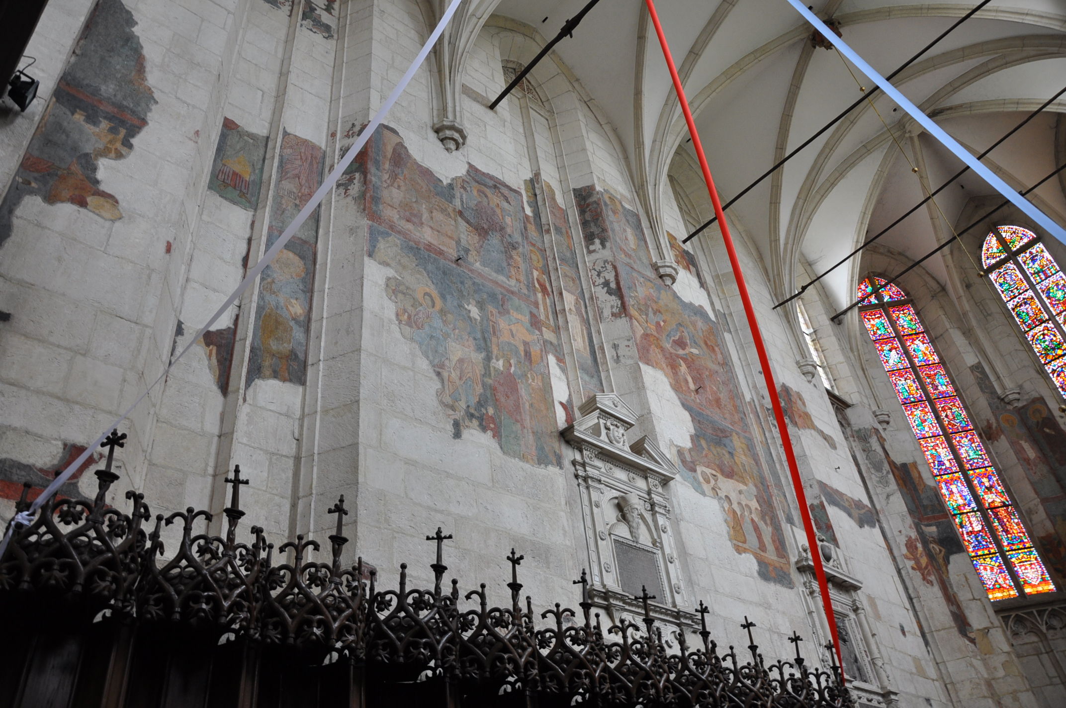 Wiślica - wnętrze, ołtarz Bazyliki kolegiackiej Narodzenia NMP (zabytek nr rejestr. A.85/1-3)